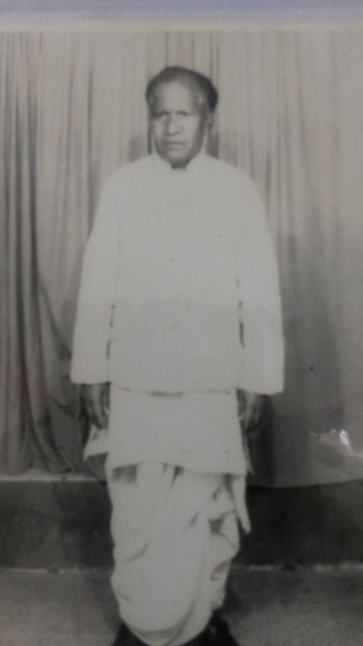 Fiji Hindi: mr. resham lal jange's older picture